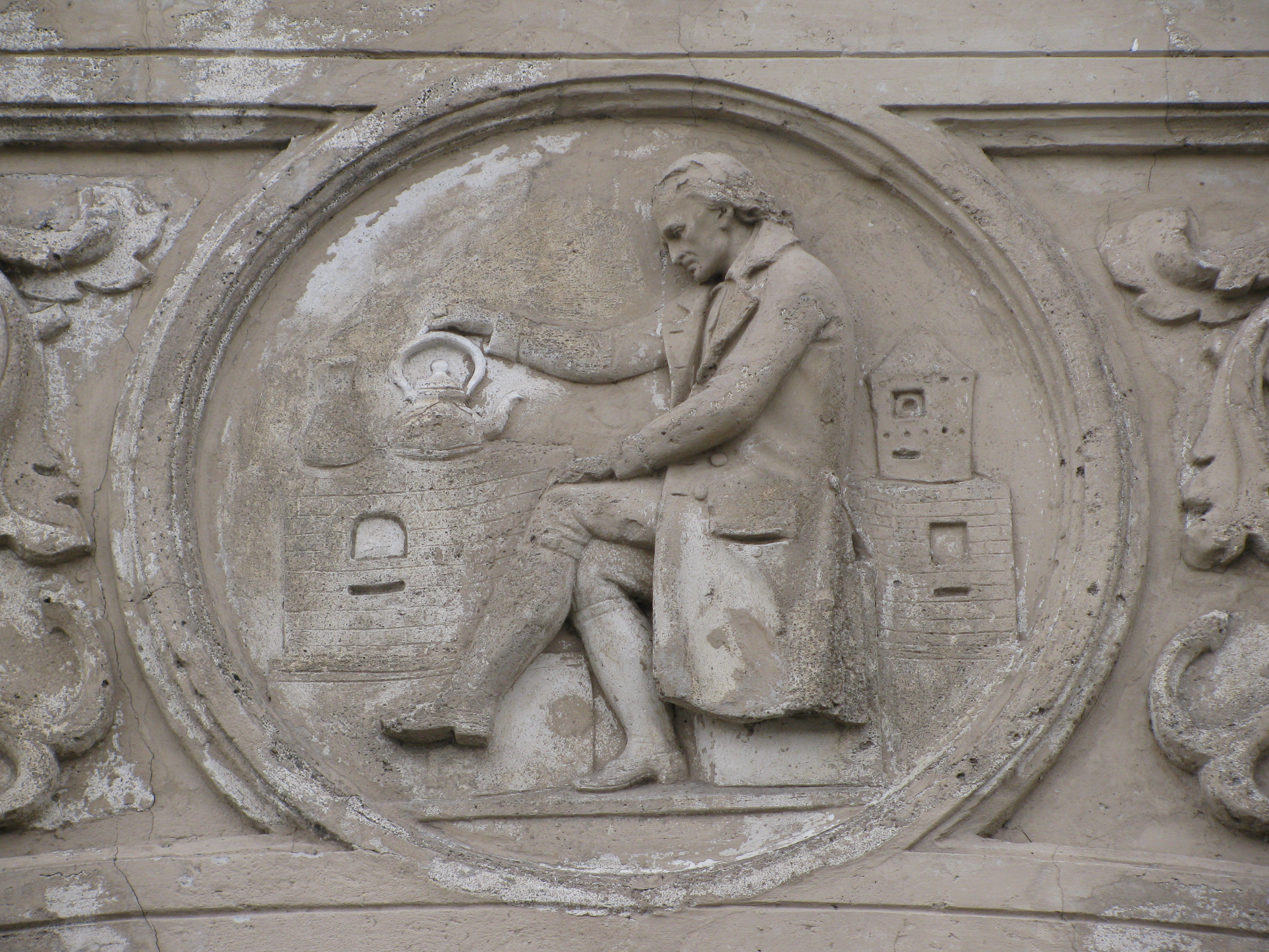 Schiffahrtsgebäude, Dresden, Detail des Denis-Papin-Medaillons